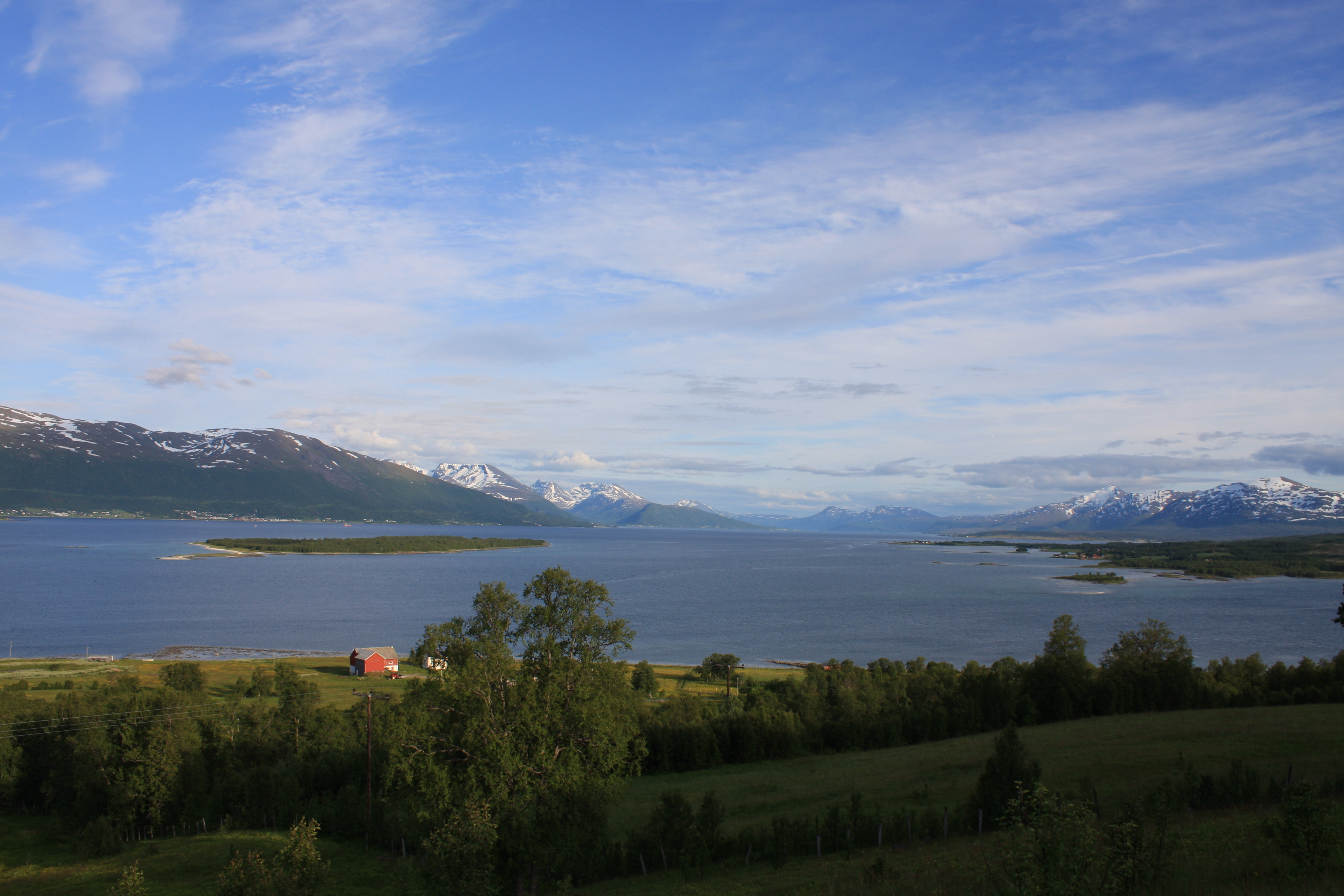 Fra Tromsø-området